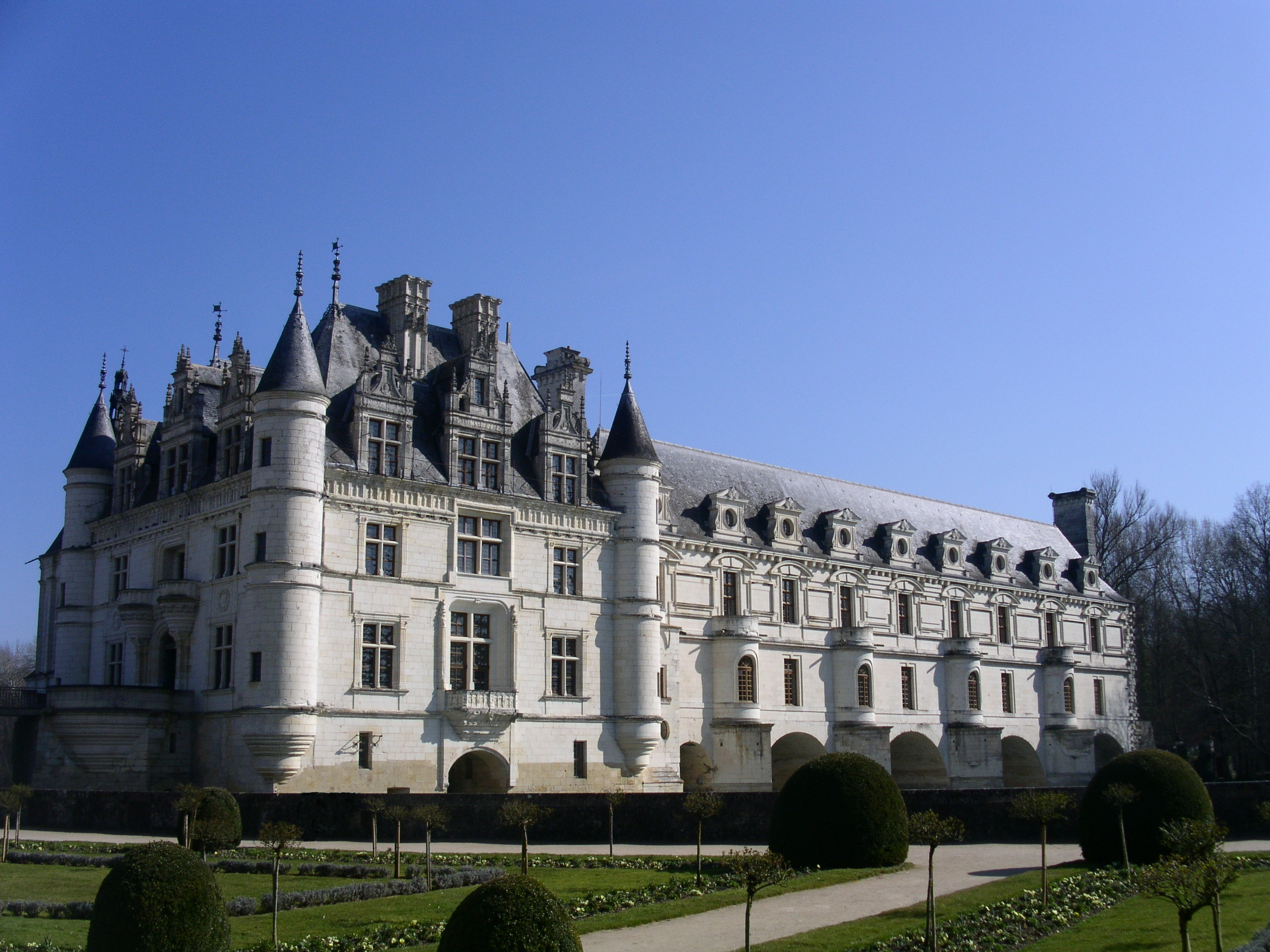 Picture of Château de Chenonceau